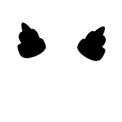 Esquisse ultra-minimaliste du Boss à Tête de Pioche (Dilbert)